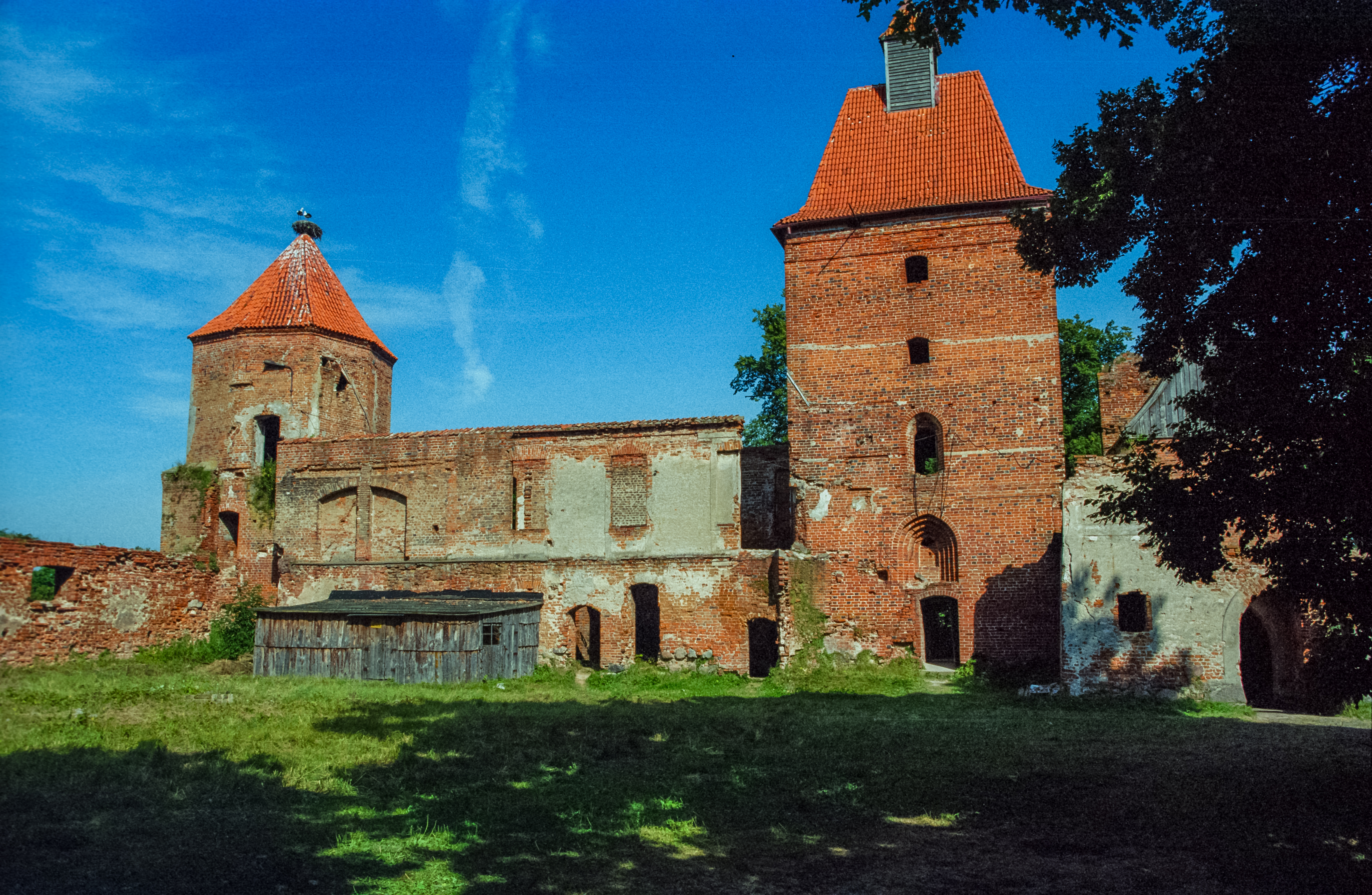 Szymbark Castle